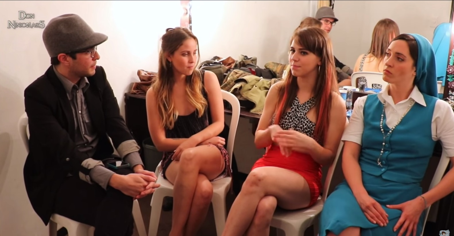 Nicolas de Llaca ft. Natasha Dupeyrón, Tessa Ia y Alexis de Anda